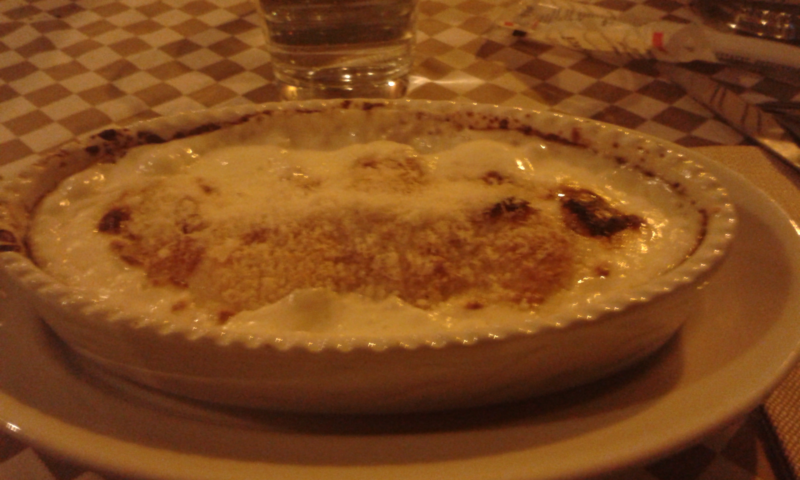 Gnocchi alla romana fotografati da me Valentinenba97 in persona con il mio cell a Roma